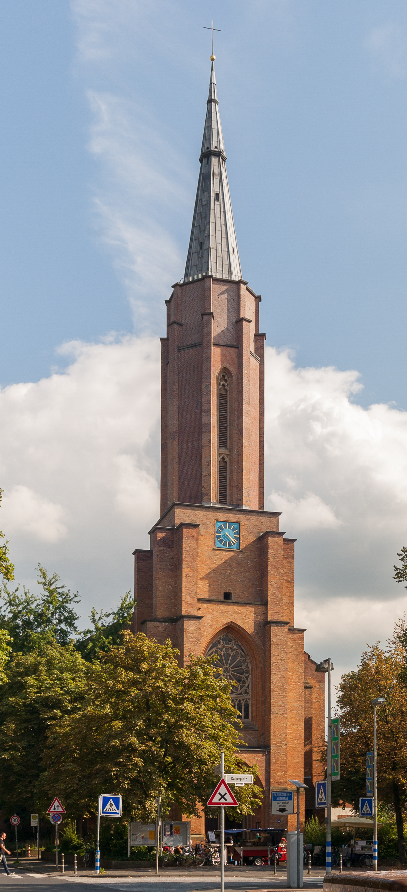 Kreuzkirche, Bonn-Zentrum